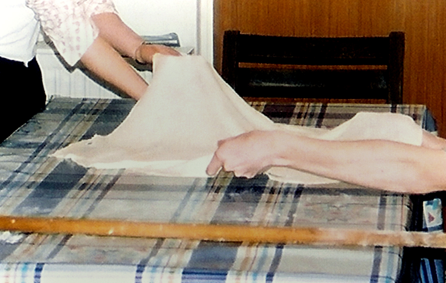 Pitabacken